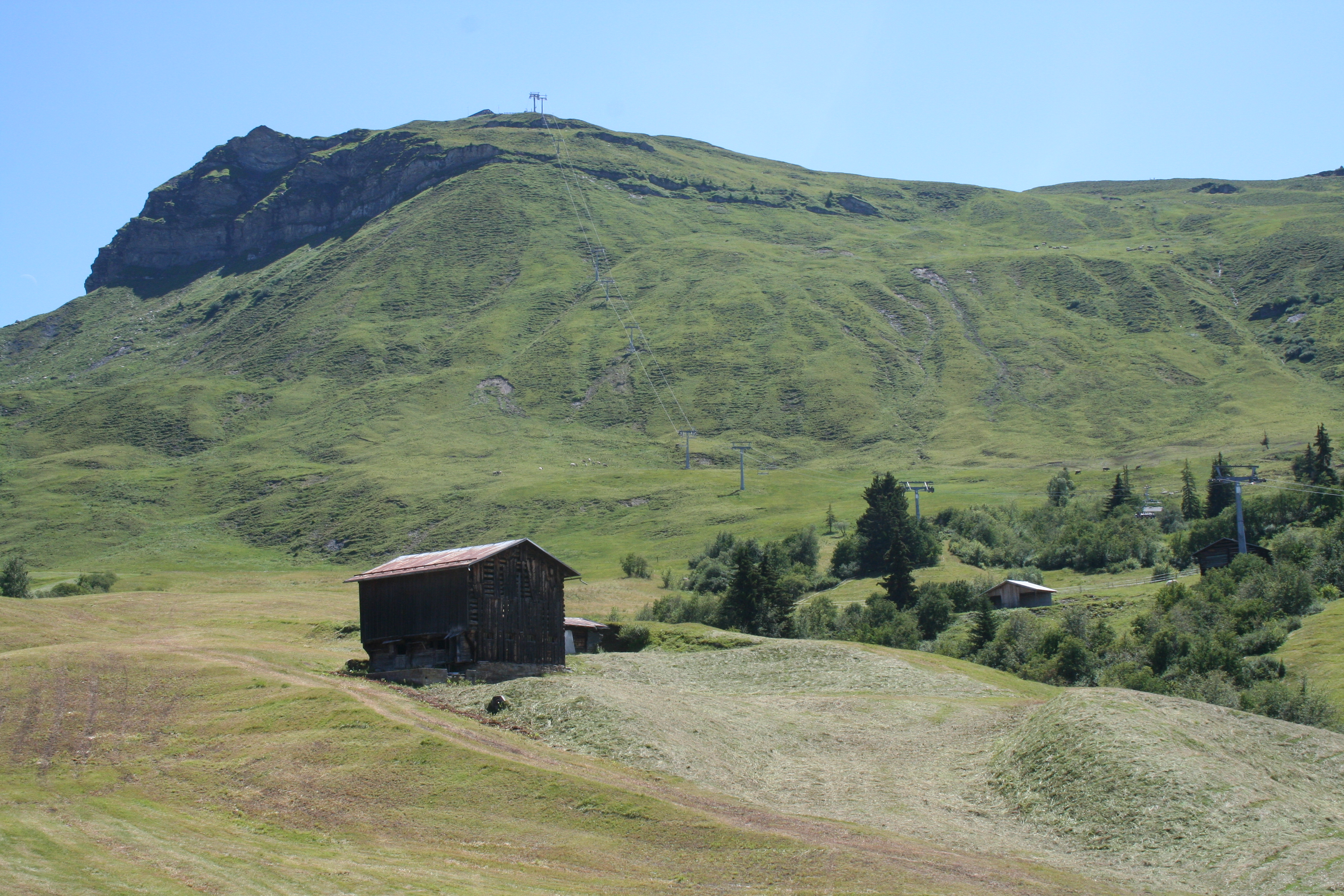 Piz Mundaun im Ausgust 2009, Nordseite